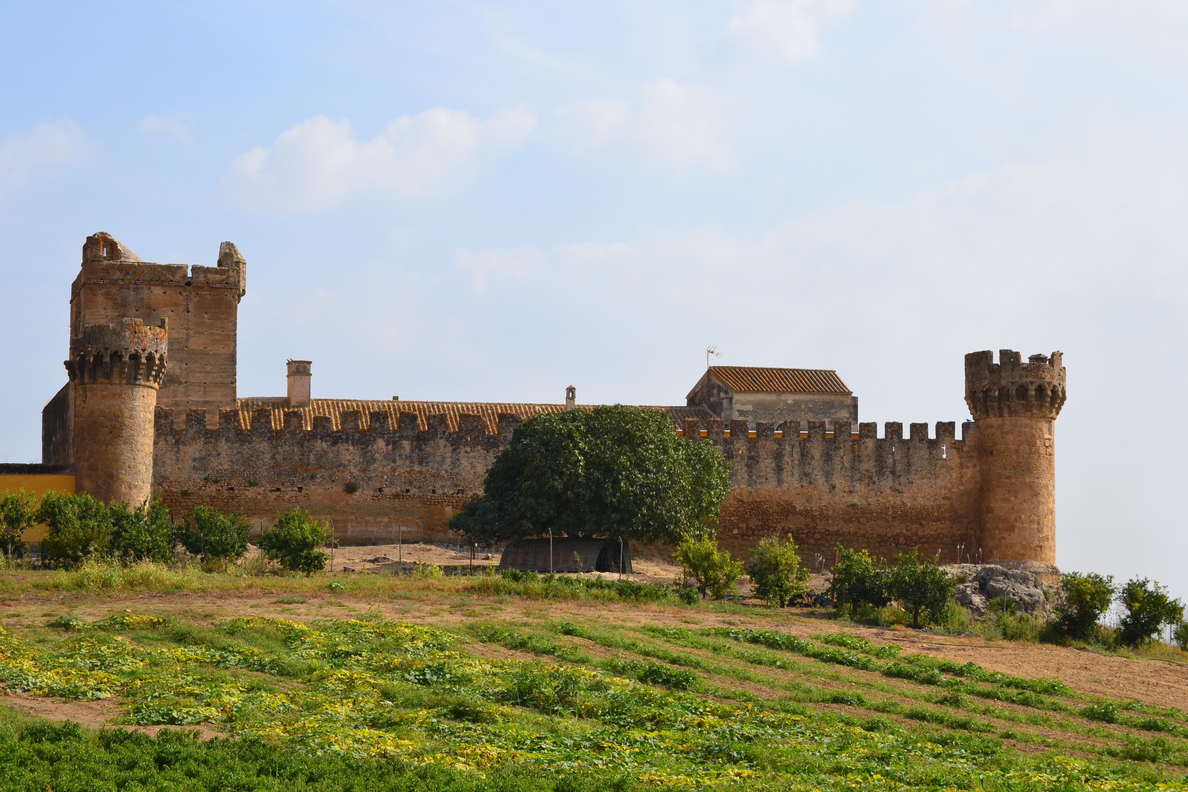 Marchenilla Castle